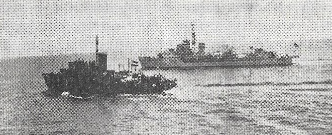 משחתת בריטית עוקבת אחרי אניית מעפילים